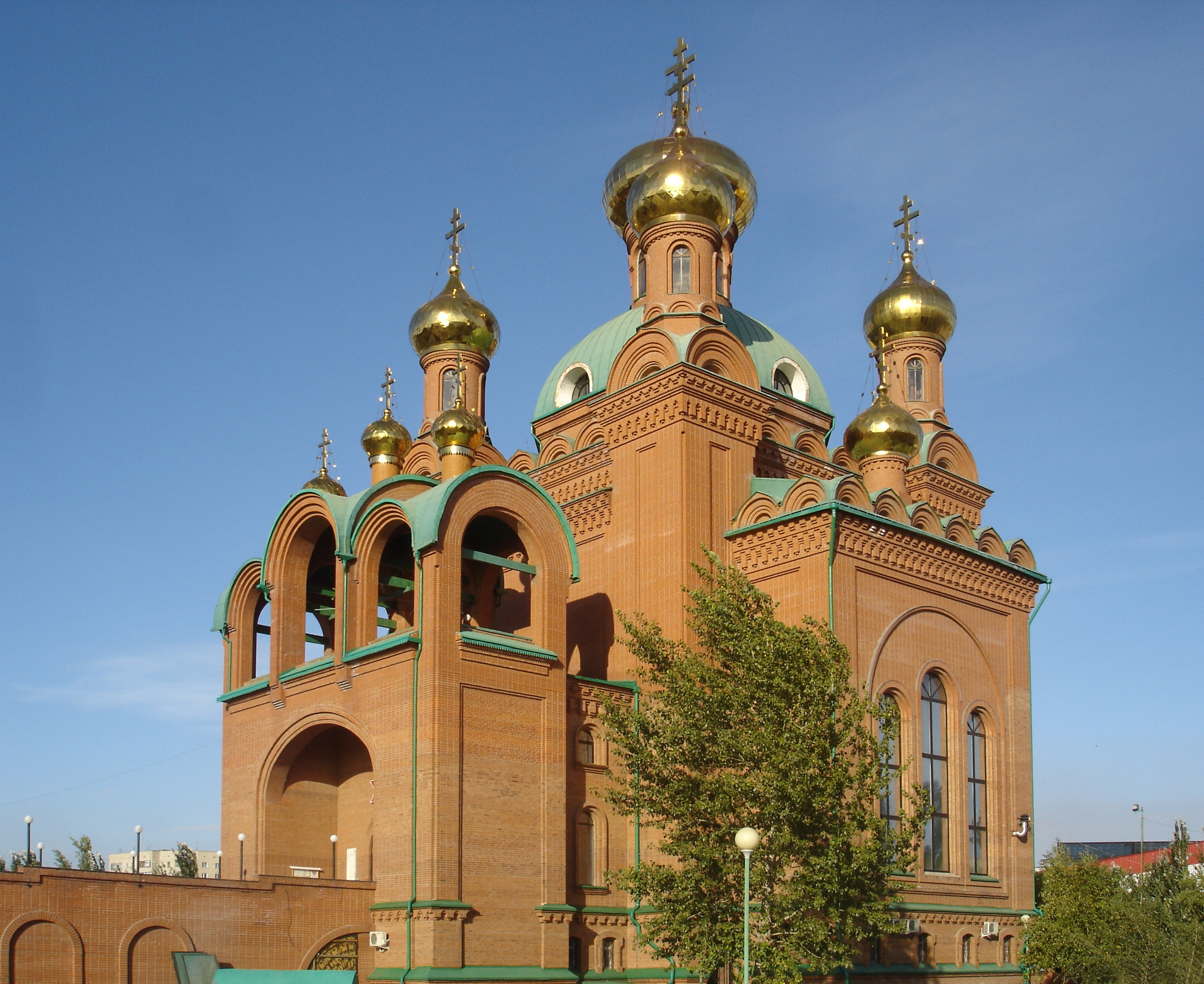 Православный Благовещенский кафедральный собор, г. Павлодар, Казахстан. Вид на здание с юго-западной стороны.